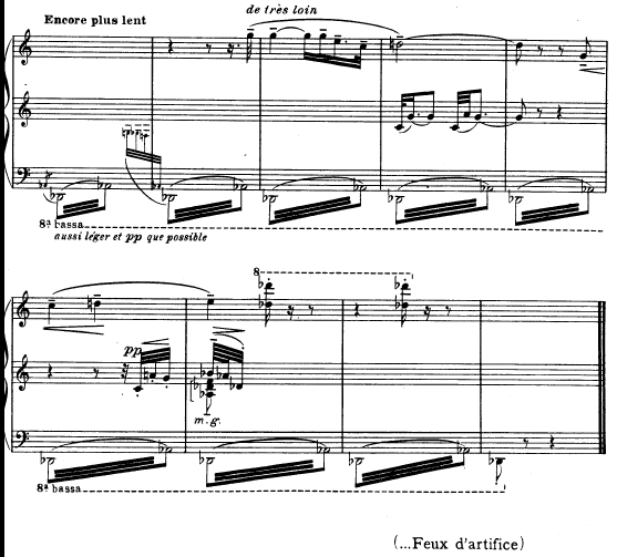 last phrade of Feux d'Artifice